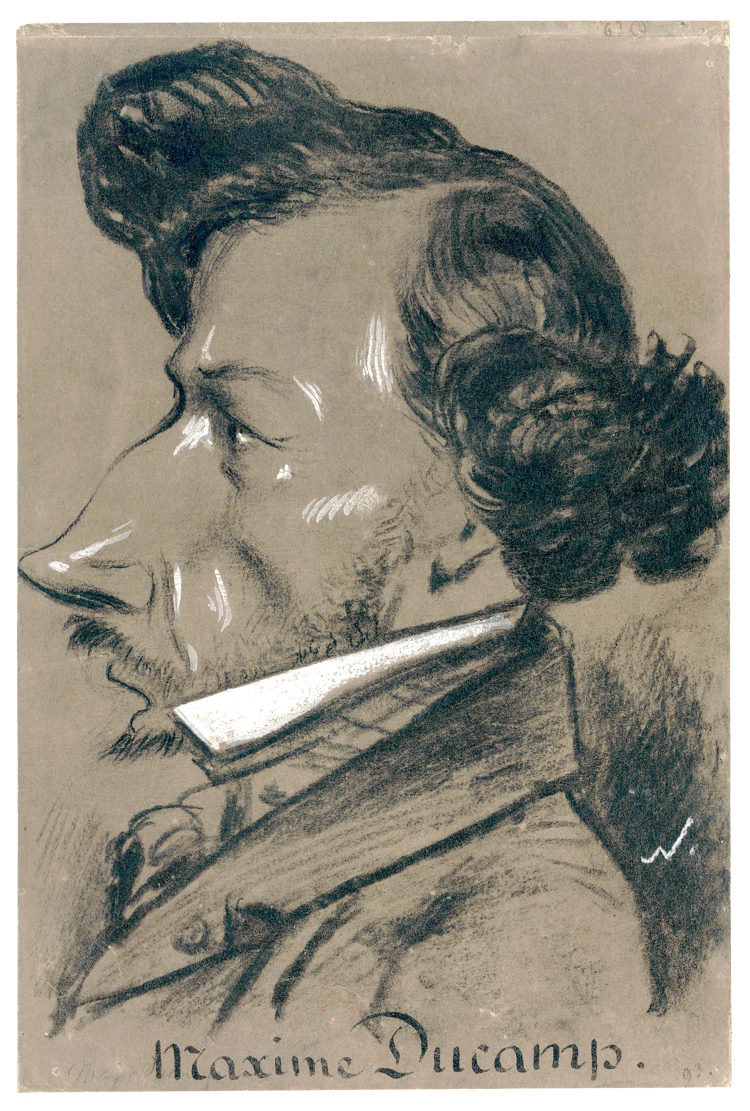 Maxime Du Camp (1822–1894)), French writer and photographer.